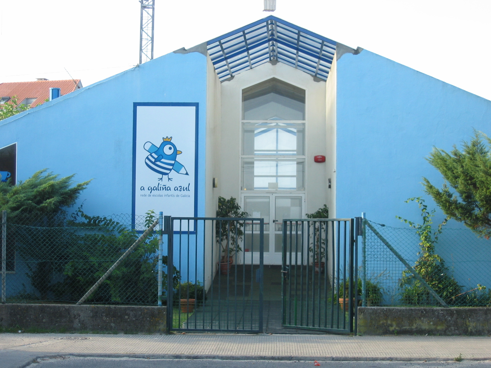 Ècole pré-scolaire en langue galicienne de la commune O Grove en Galice (Espagne)